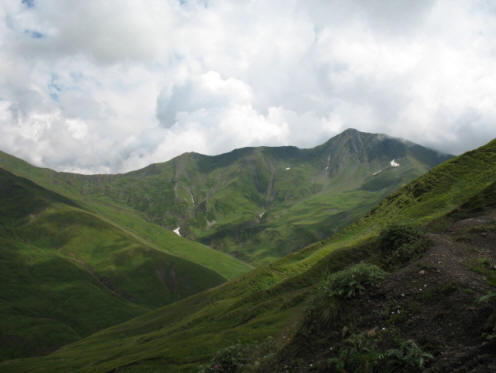 ბორბალოს მთა ფშავში